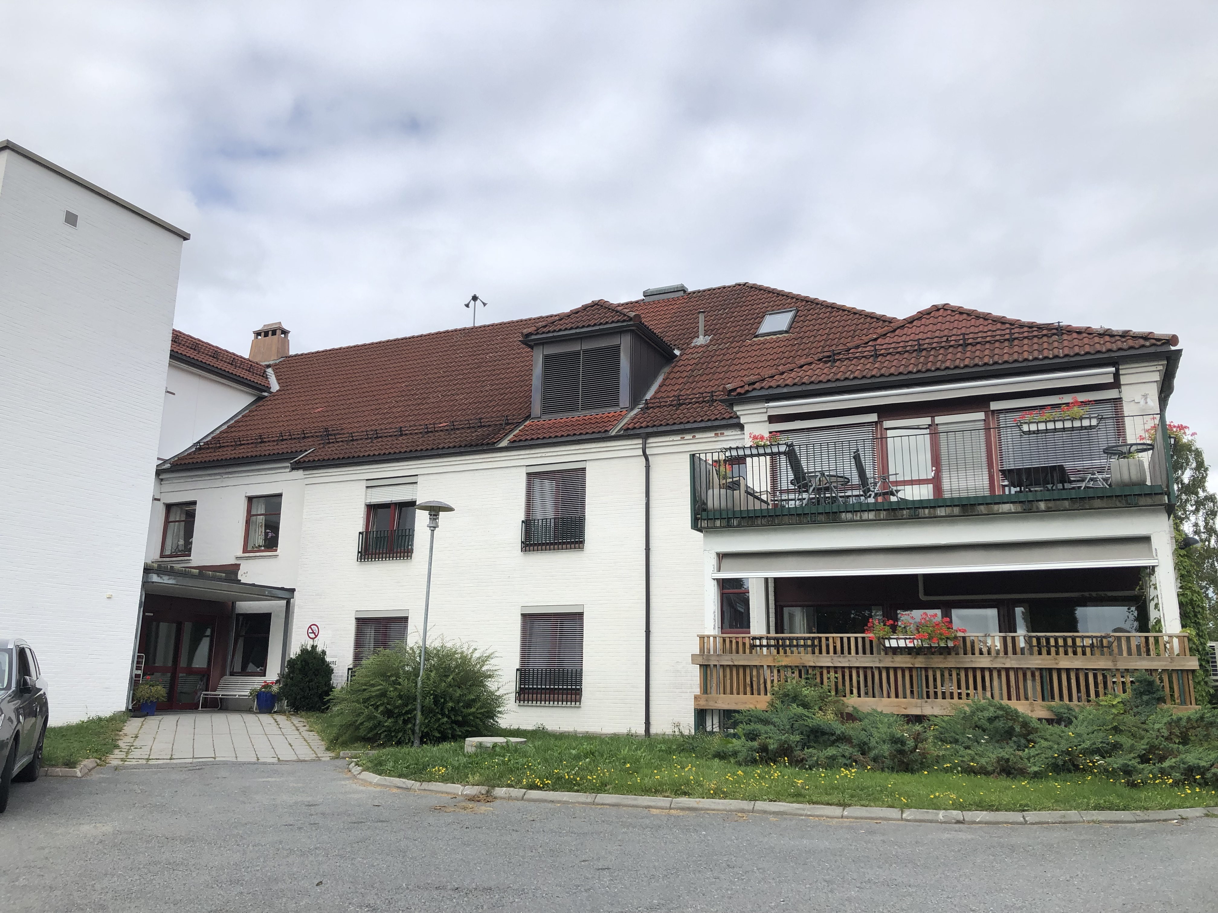 Hønefoss sykehjem, Vesterngata 18, Hønefoss i Ringerike kommune.